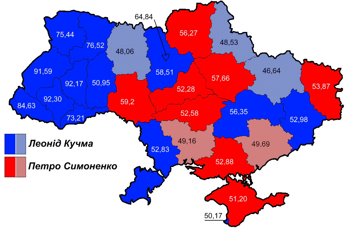 Вибори в Україні 1994. Україномовна версія мапи